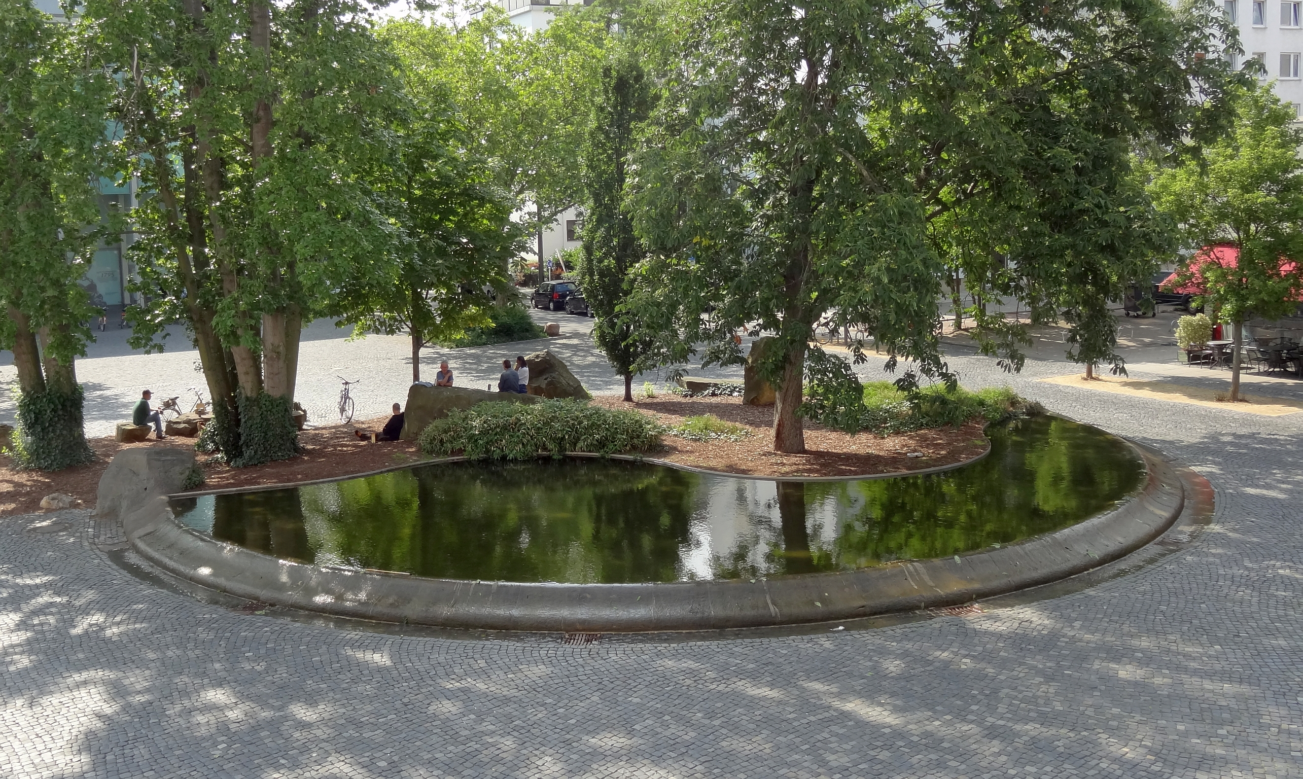 Brunnen an der Friesenstraße in Braunschweig - zwischen kleinem Haus des Staatstheaters und SchlossArkaden gelegen.